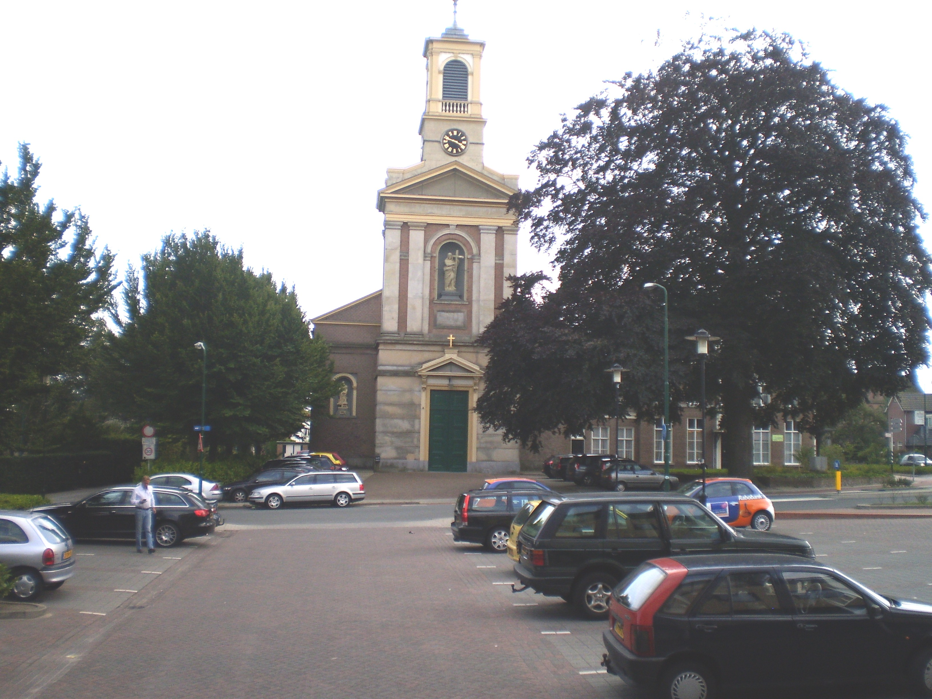 Ofbyld oanbean troch Swarte Kees op 18 augustus 2009